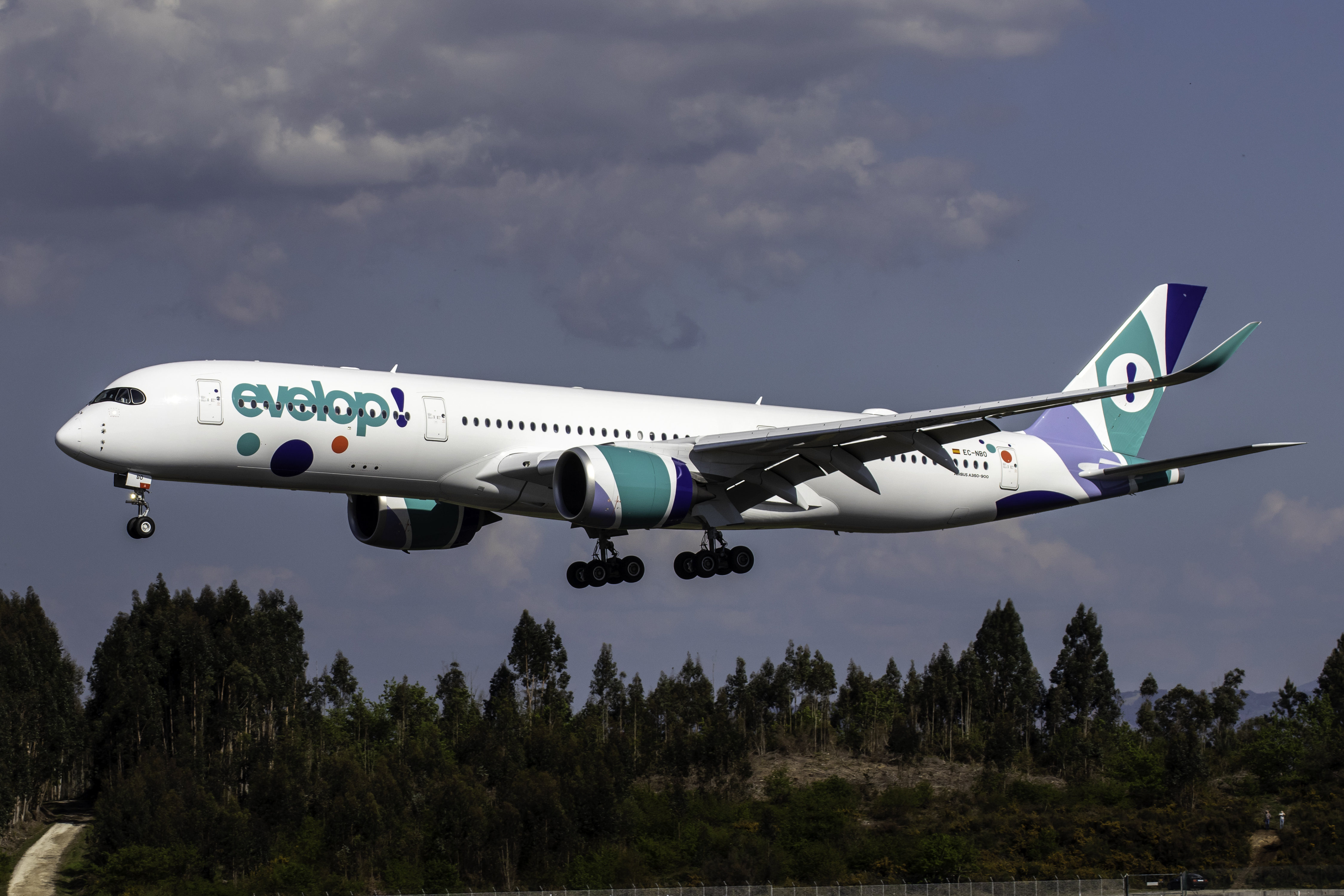 Airbus A350 de Evelop aterrando no aeroporto de Santiago de Compostela.